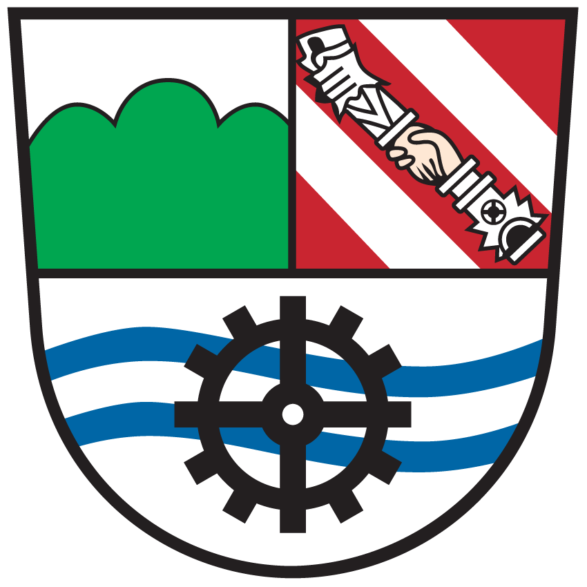 Wappen von Brückl